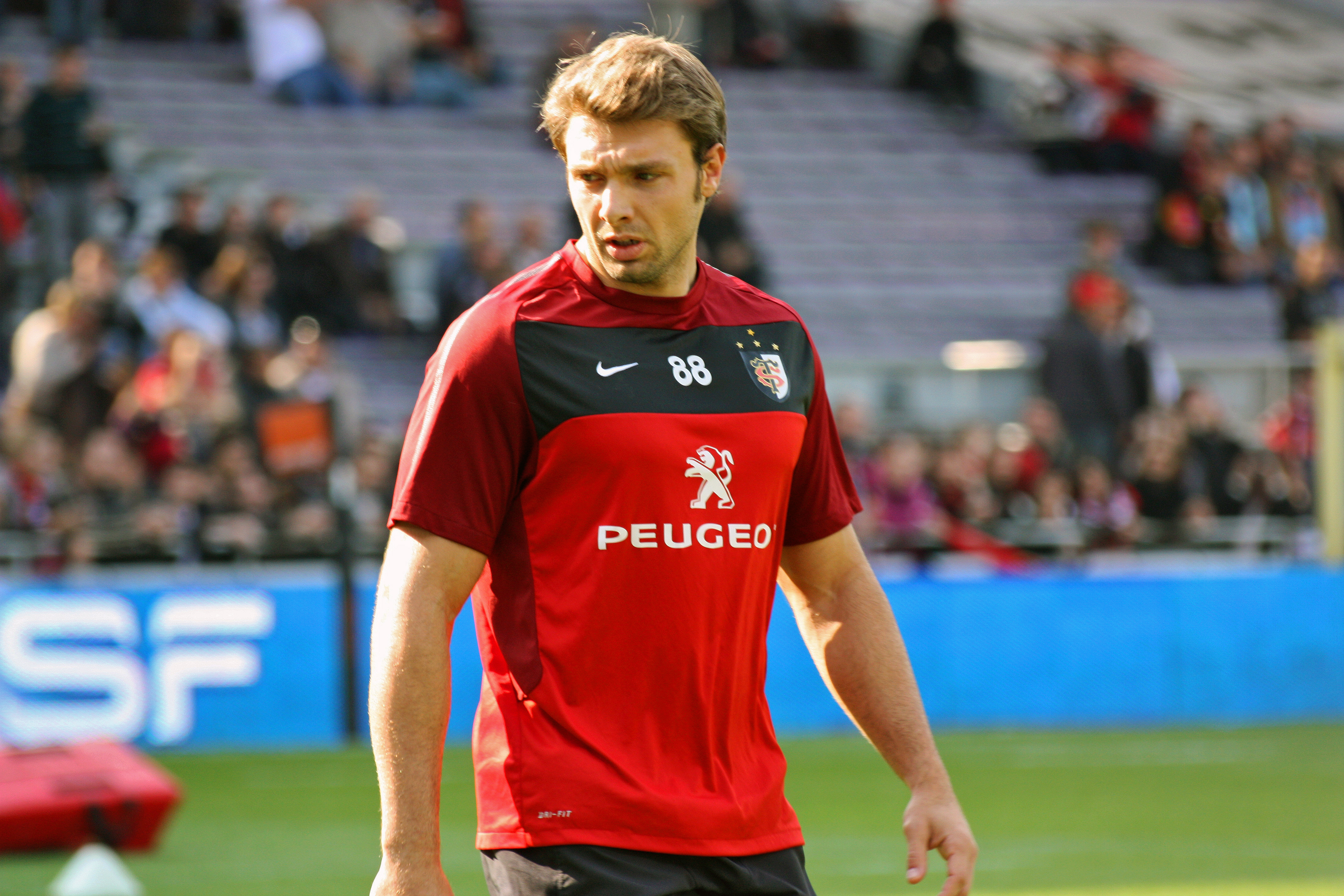 Vincent Clerc à l'entrainement avant un match contre l'USA Perpignan